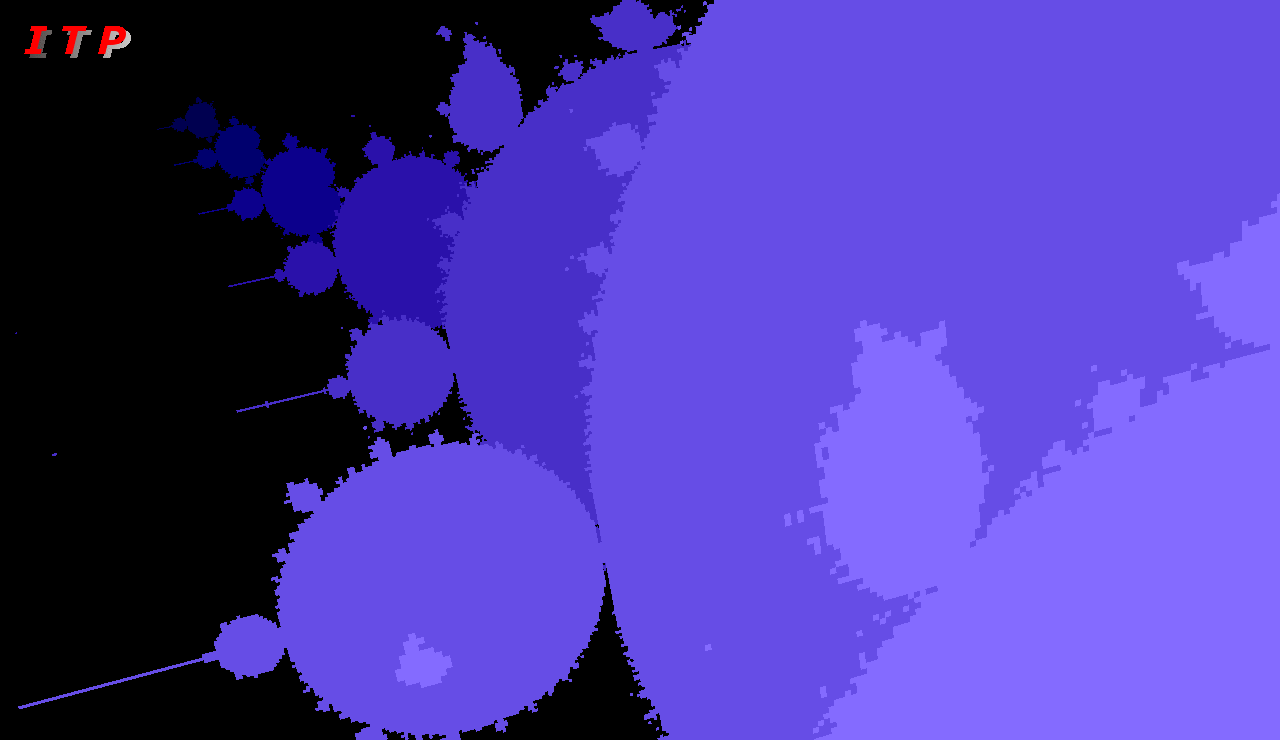 Schnitte durch die dreidimesionale Darstellung der Menge der zugehörigen Funktionen